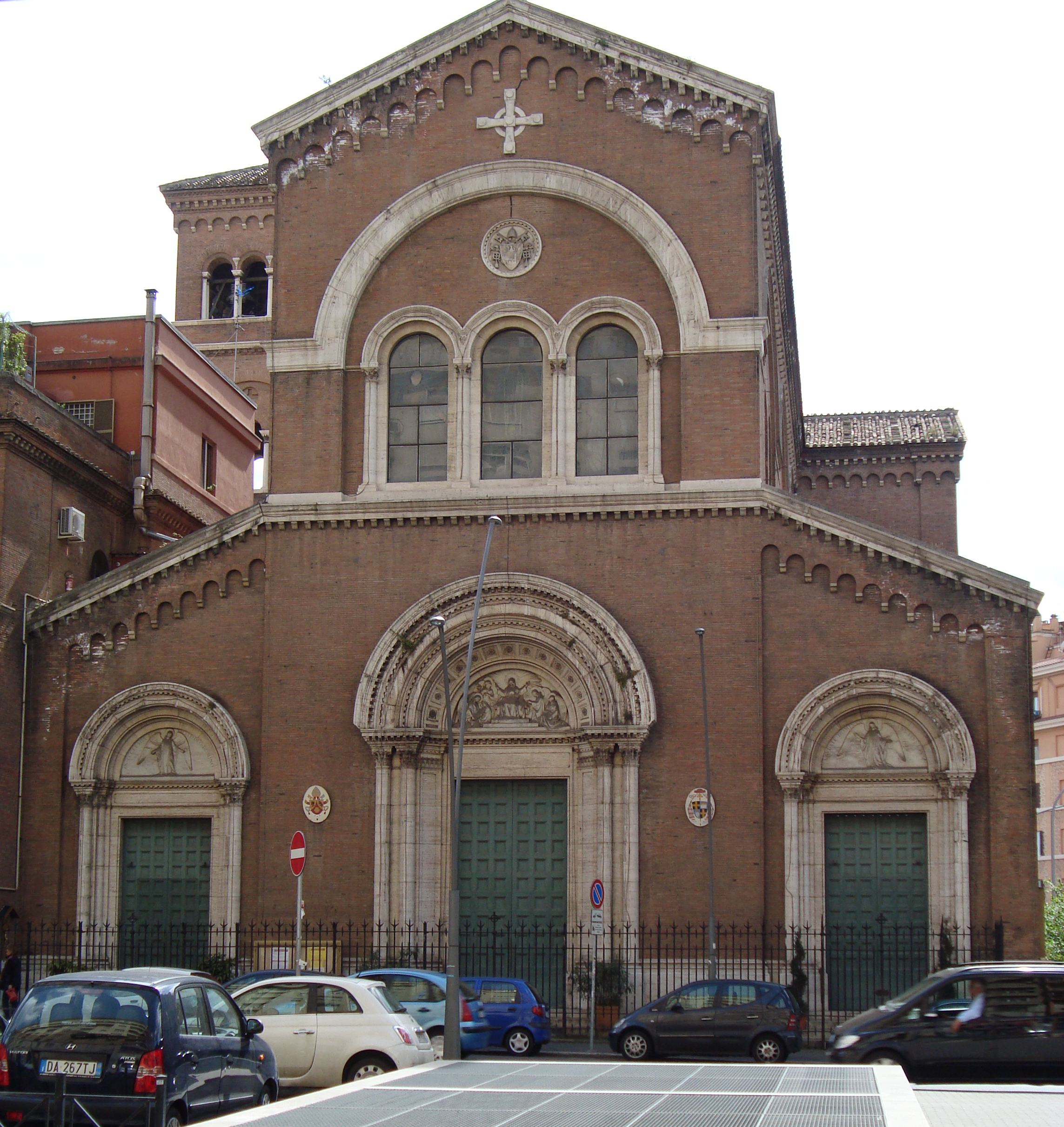 Eglise di Ognissanti à Rome sur l'Appia Nuova dans le quartier Appio Latino